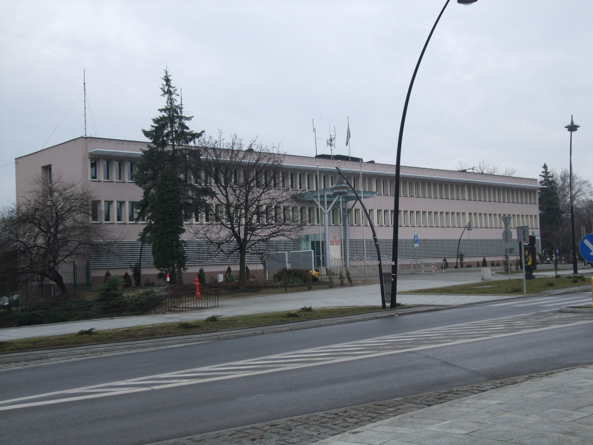 Budynek Urzędu Miejskiego, 43-600 Jaworzno ul.Grunwaldzka 33.